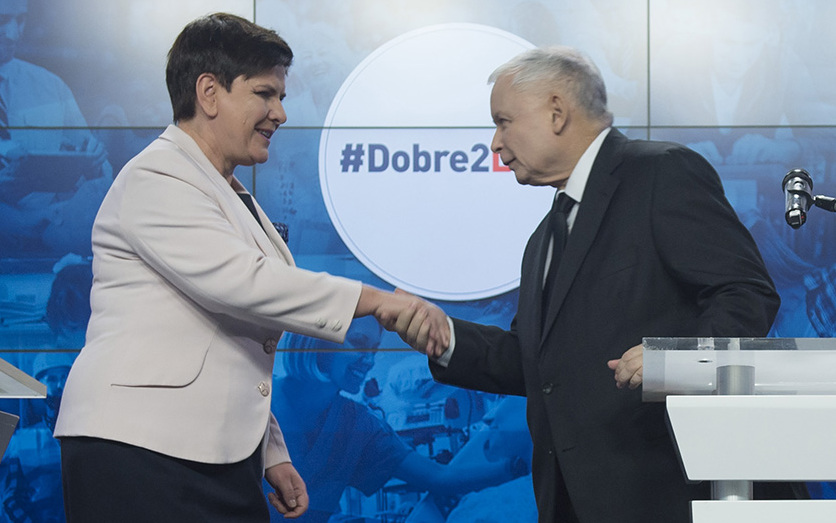 2017.11.14 Warszawa. Premier Beata Szydło i prezes Jarosław Kaczyński podsumowali 2 lata rządu Prawa i Sprawiedliwości.